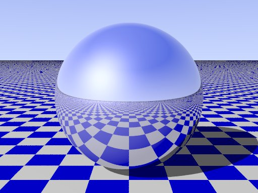 POV-Ray przykład wygenerowanej sceny